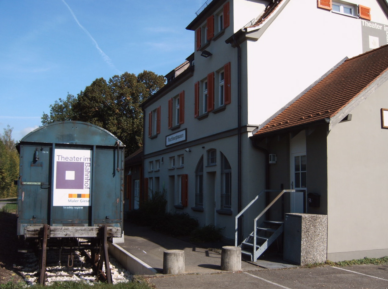 Bahnhofsgebäude Rechberghausen der ehemaligen Hohenstaufenbahn